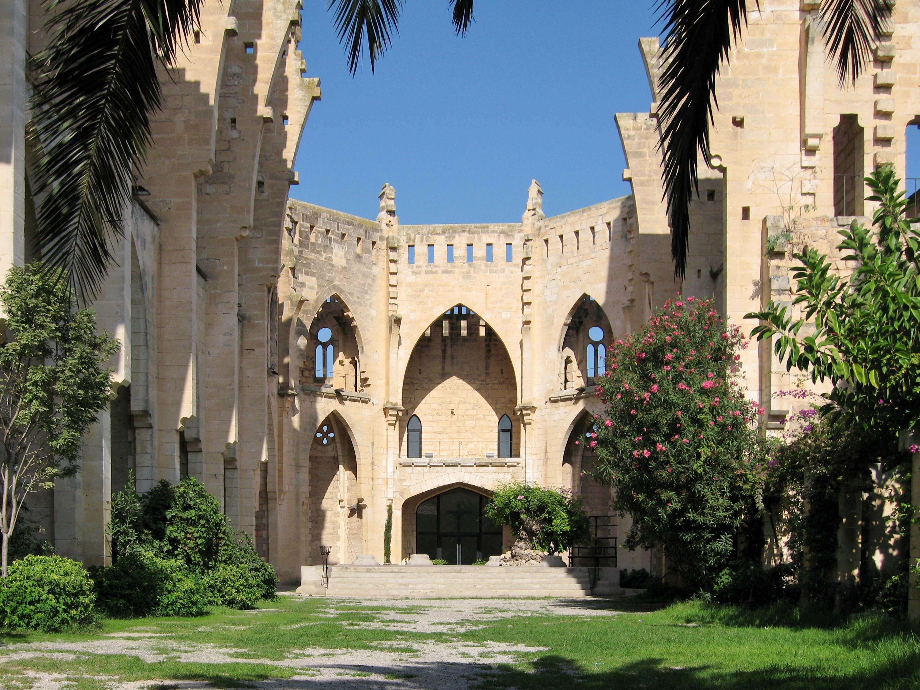 Unvollendete Kirche Església Nova in Son Servera, Mallorca, Spanien